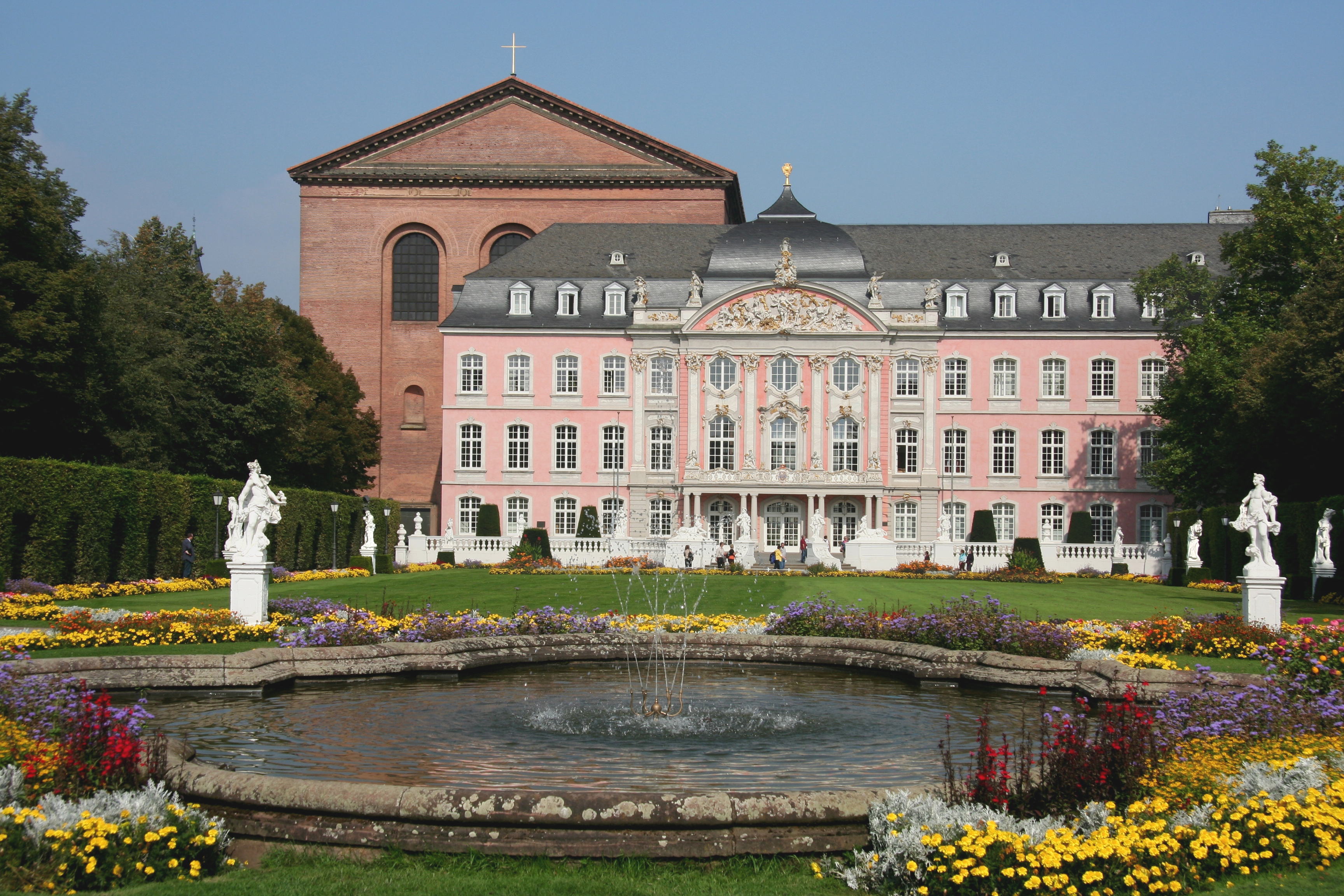 Kurfürstliches Palais in Trier, links im Hintergrund die Konstantinbasilika